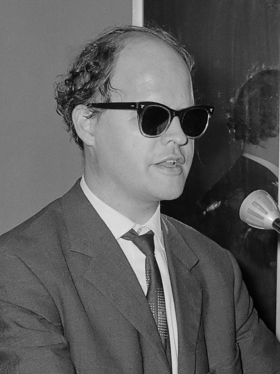 Opdracht Nederlandse Jeugd Gemeenschap (afscheid ds. Steinbeek). Toespraak Jules de Corte 25 september 1964